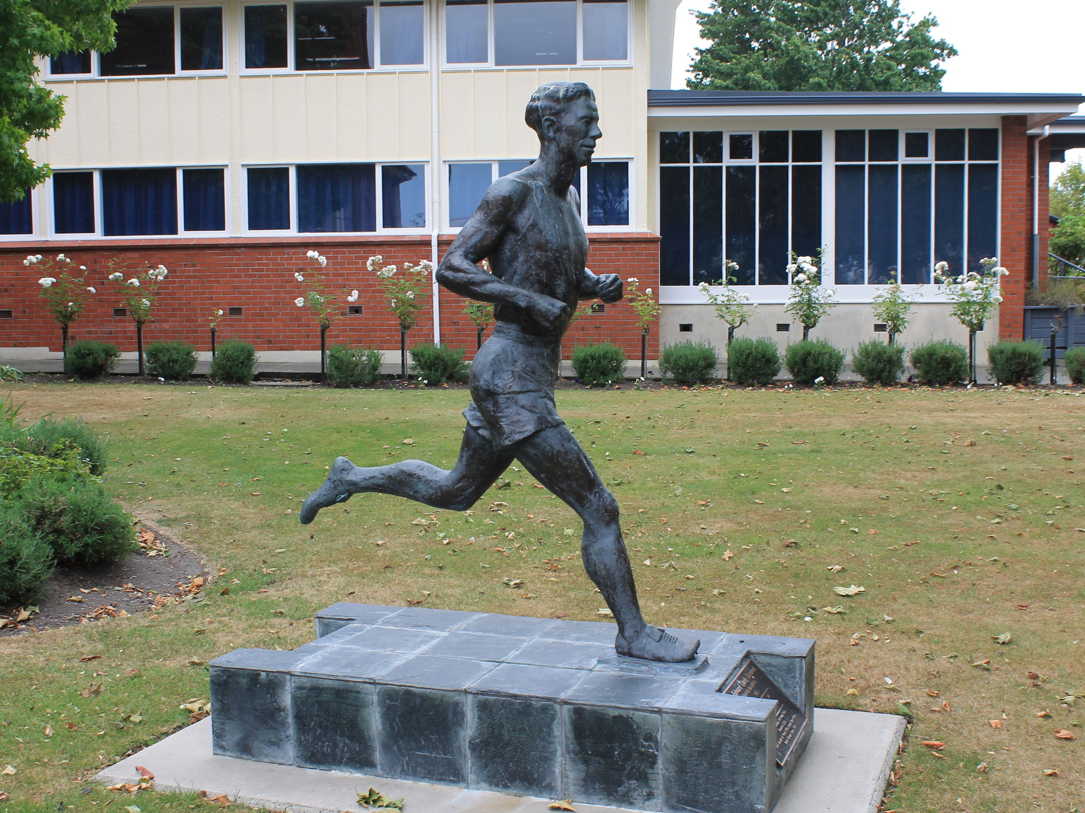 Statue des Olympiasiegers Jack Lovelock, Timaru Boys High School, Timaru NZ